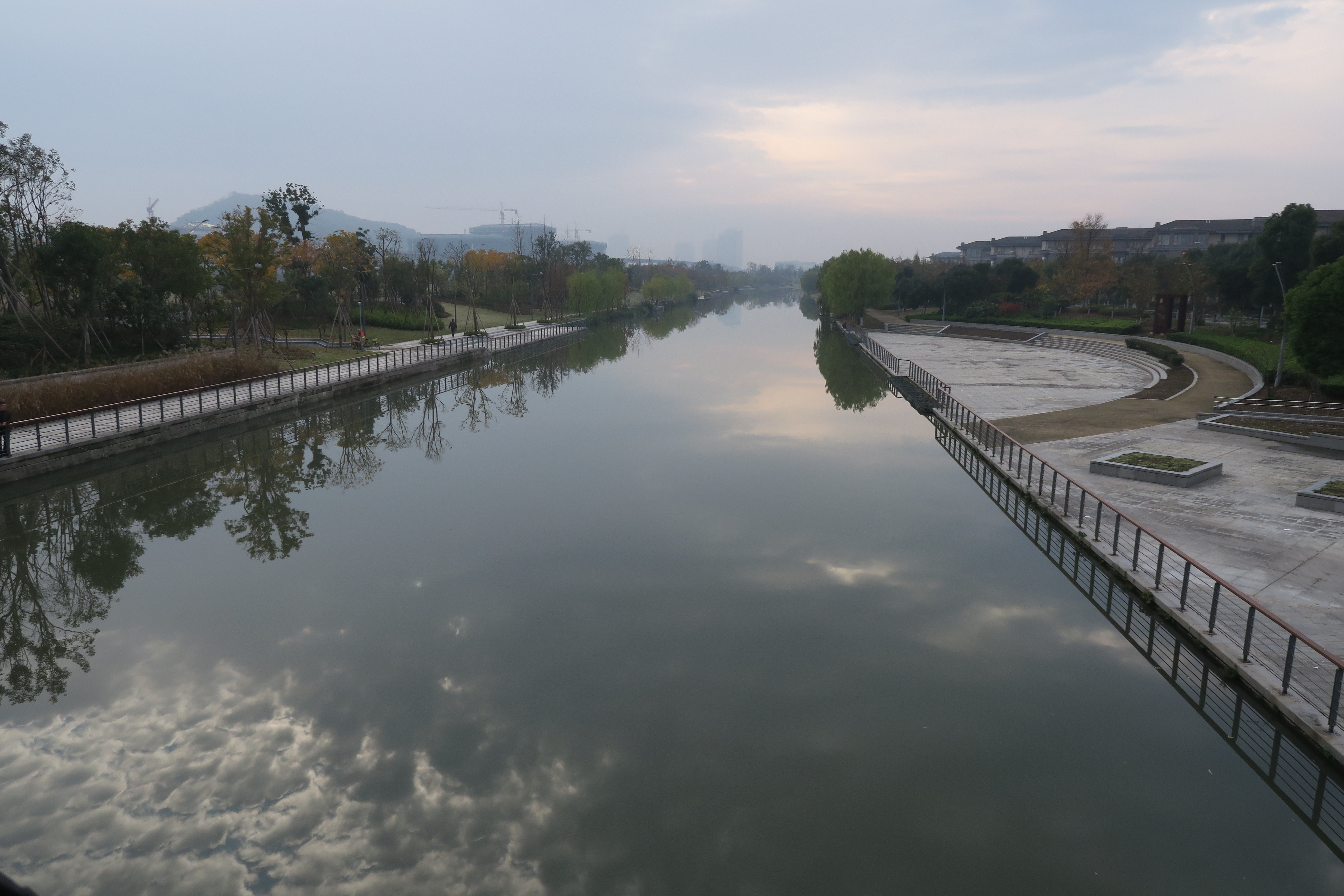 官山河（浙东运河宁波段）